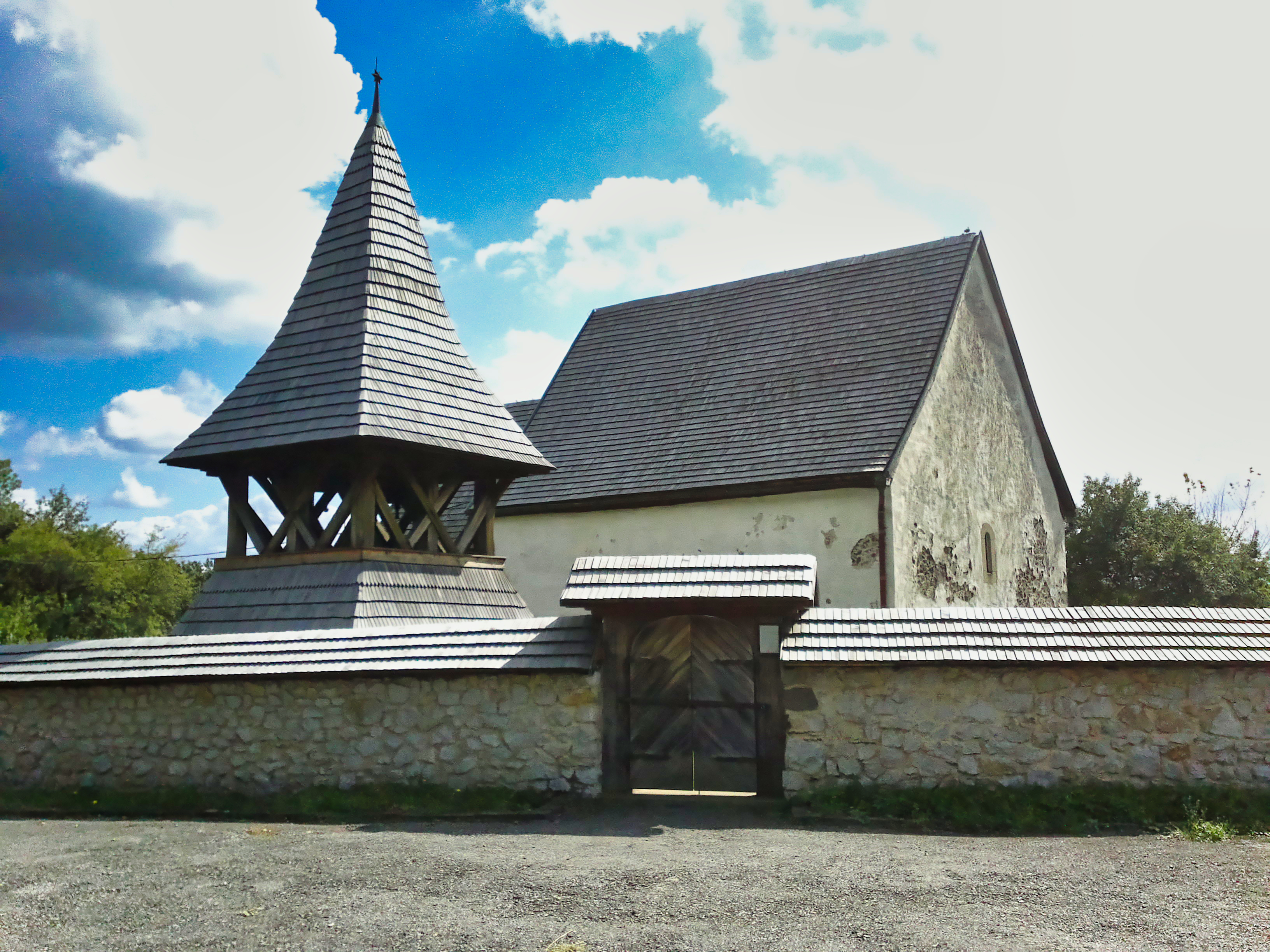 Kostol Kraskovo vstupná brána do areálu kostola